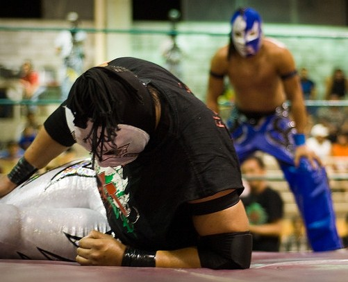 Trauma I vs. Trauma II